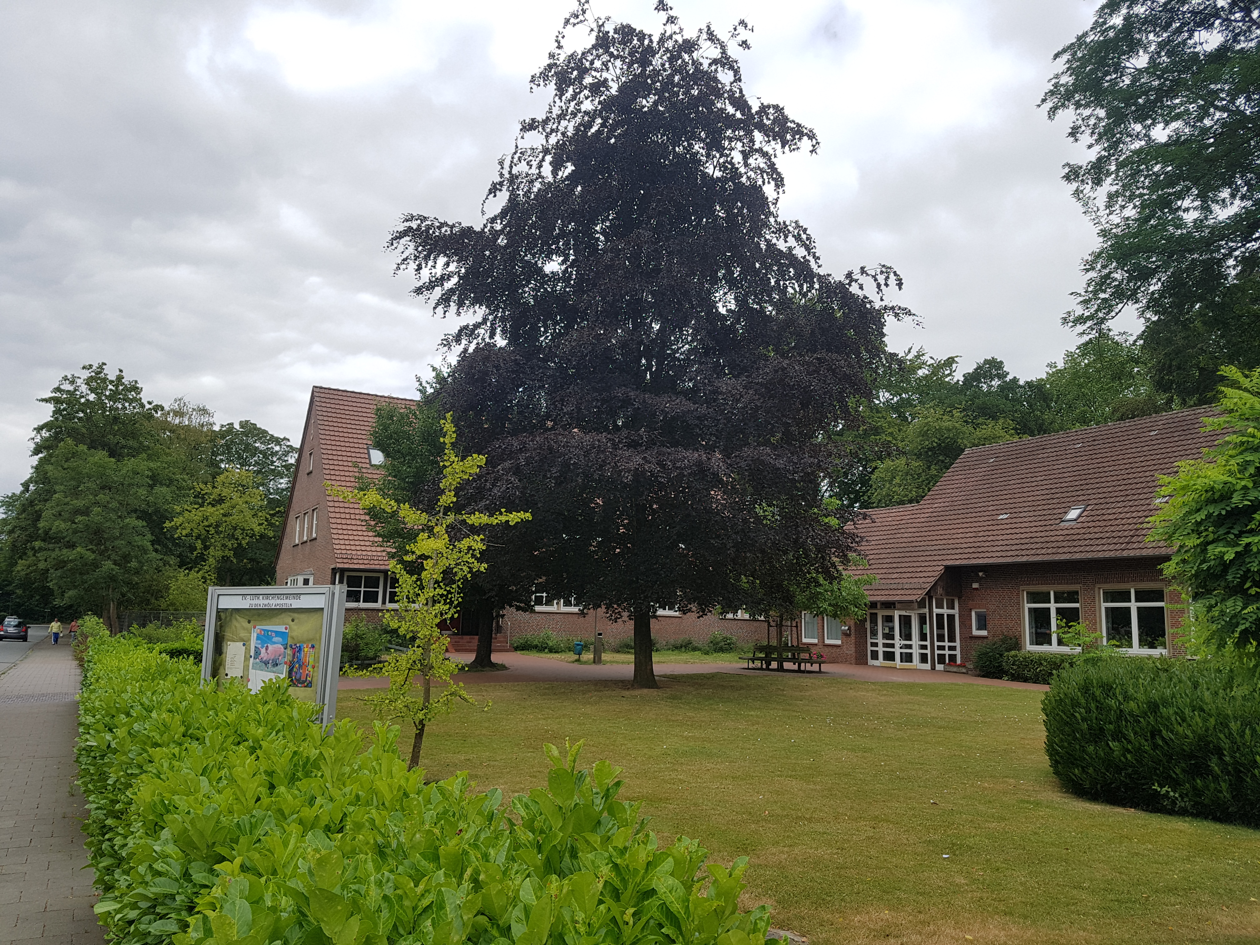 Kark To de twölv Apostels in Demost